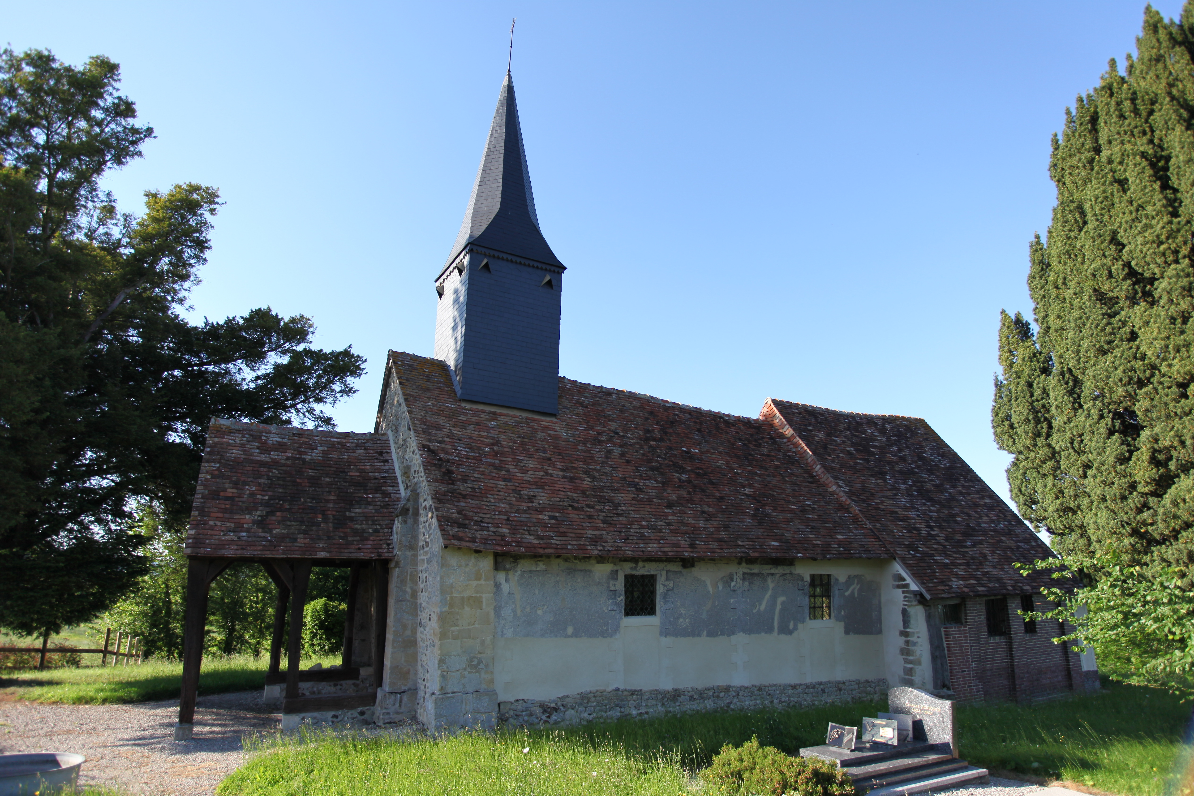 Église de Saint-Martin du Mesnil-Oury, Calvados, France